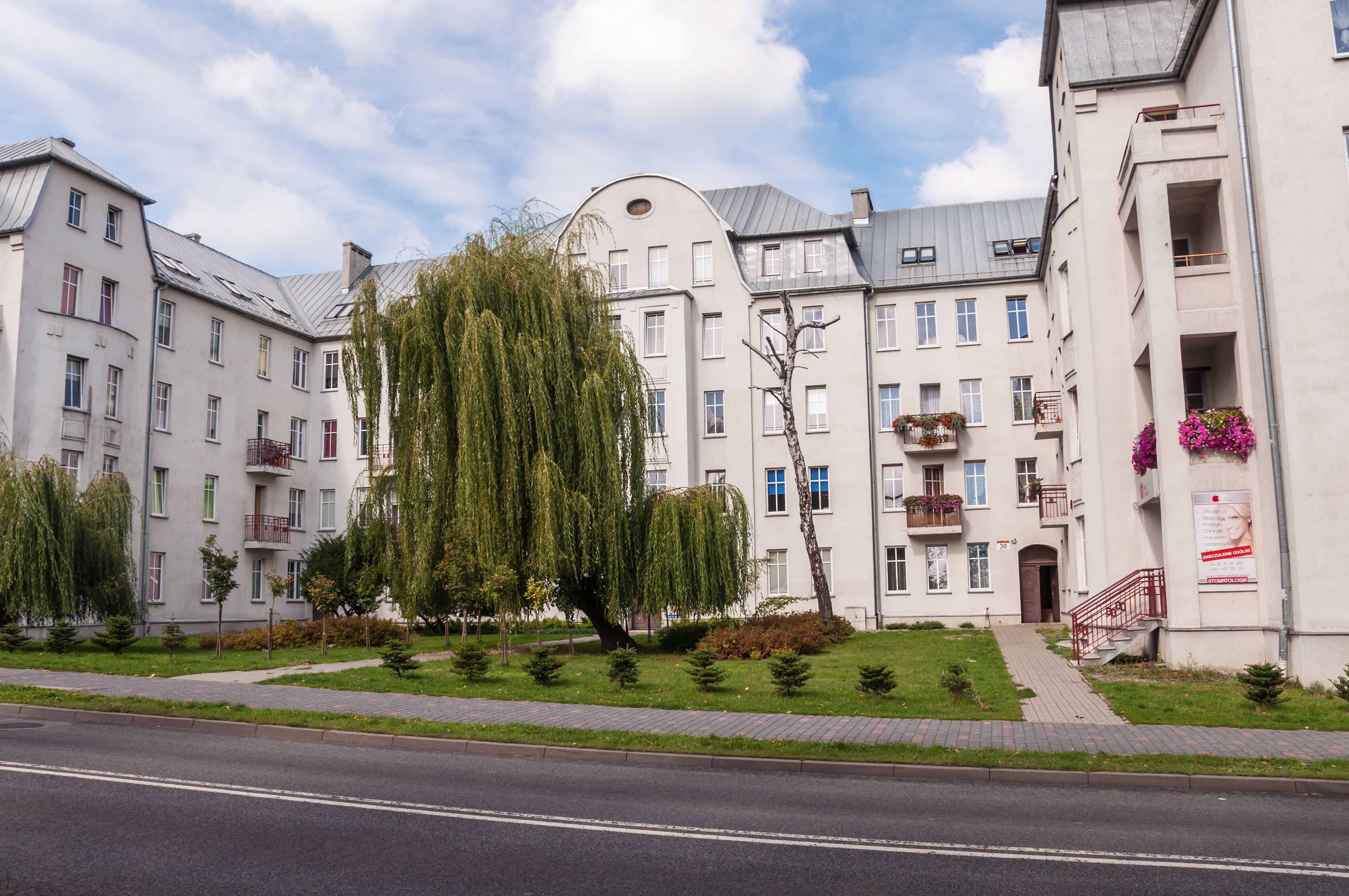 Mysłowice, ul. Mikołowska 26-36. Dom (dec. 6 domów - blok zabudowy), 1915.